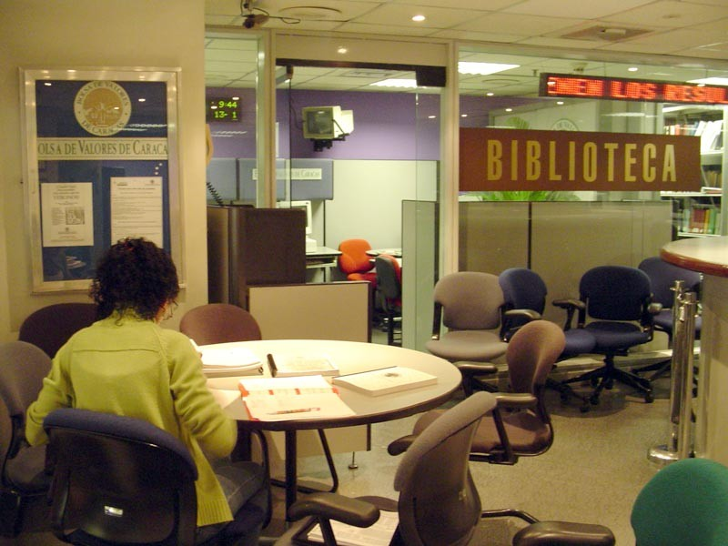 Foto tomada por Hugo Londoño de la Biblioteca de la Bolsa de Valores de Caracas.